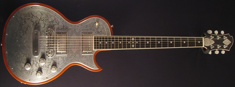 Zemaitis Metal Front guitar